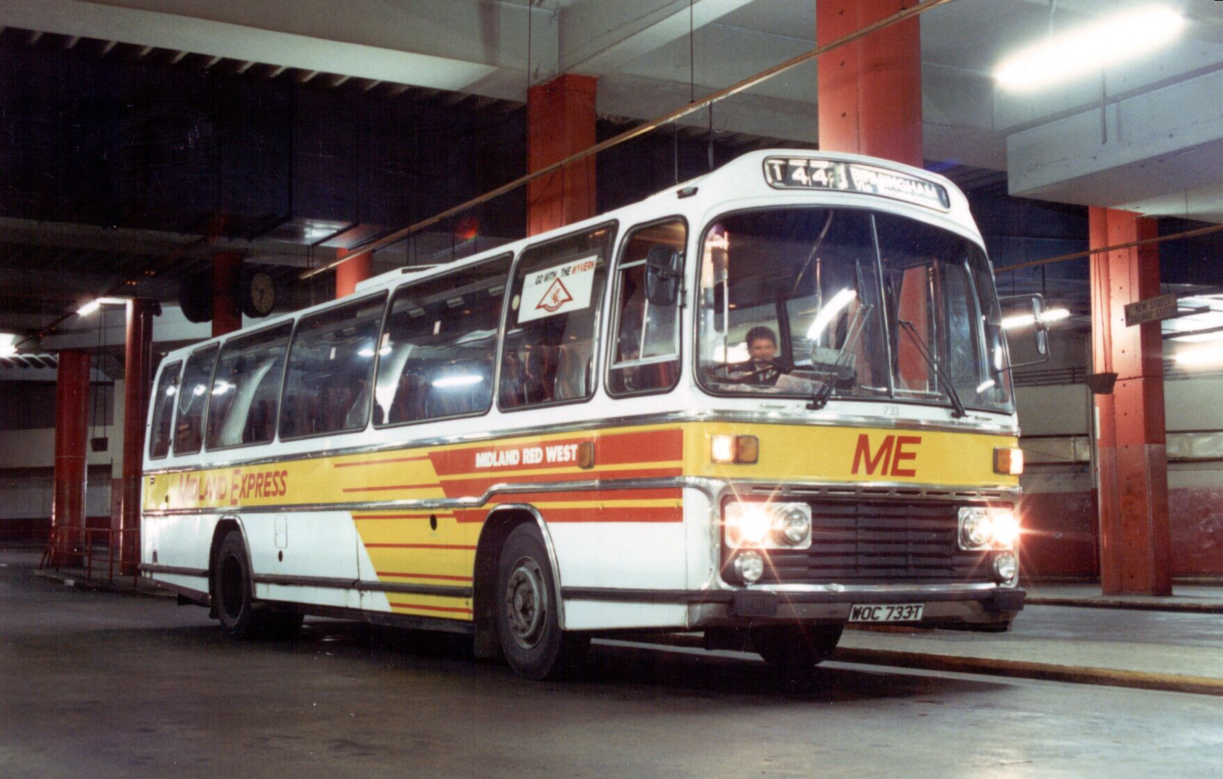 0733-kx 310389 cps